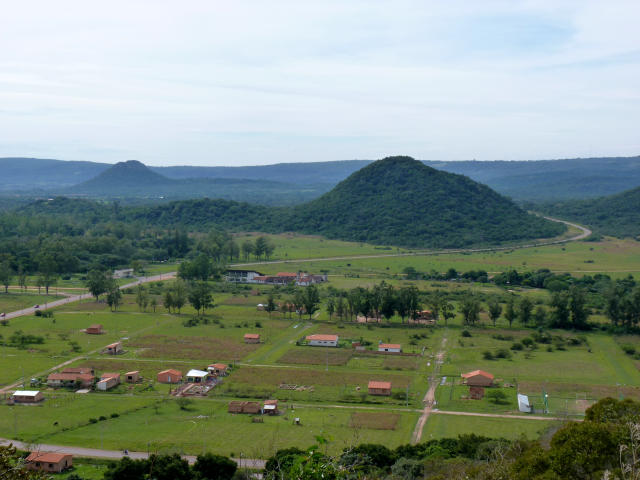 vista de la Cordillera de Paraguari